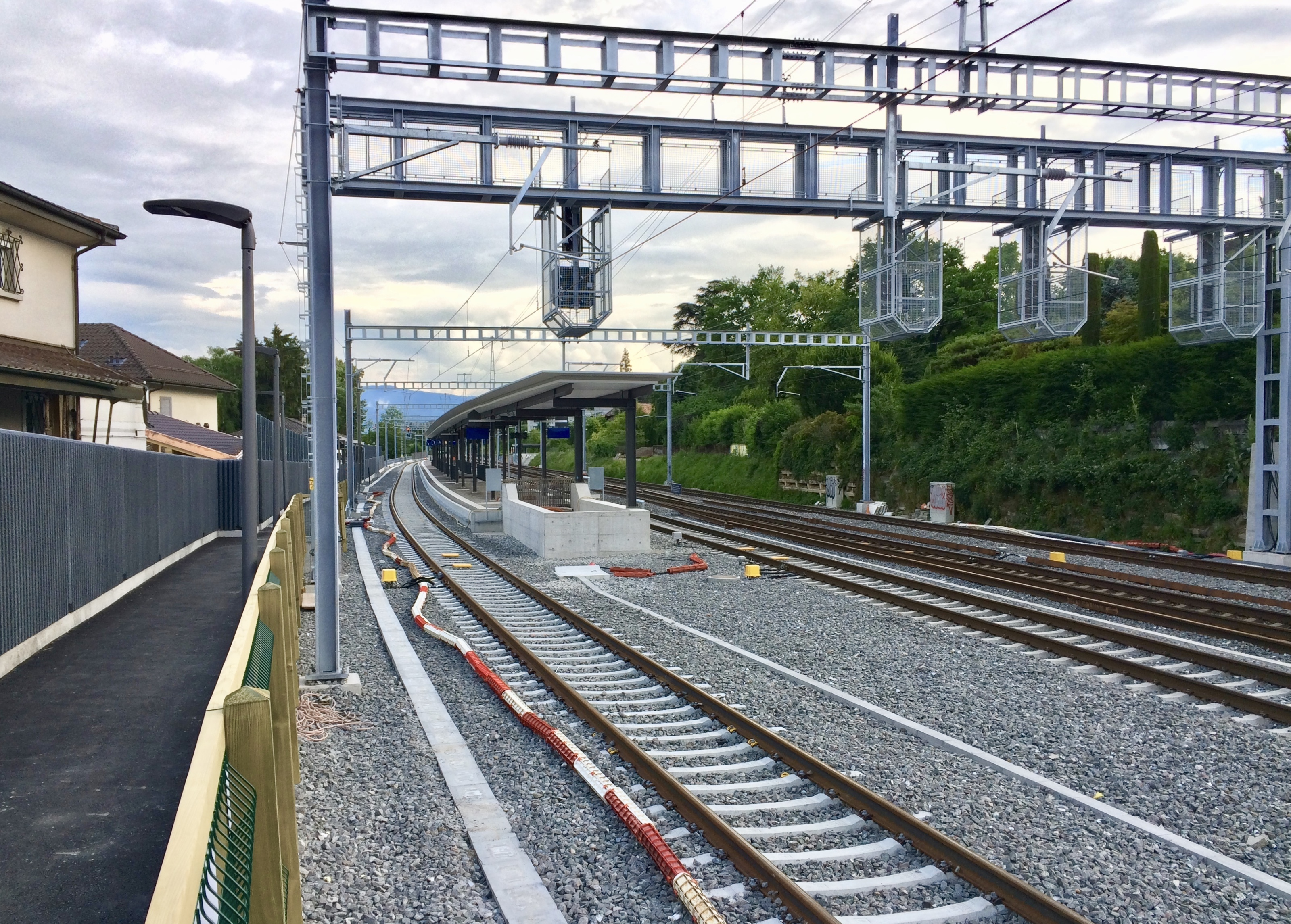 La nouvelle gare de Chambésy.